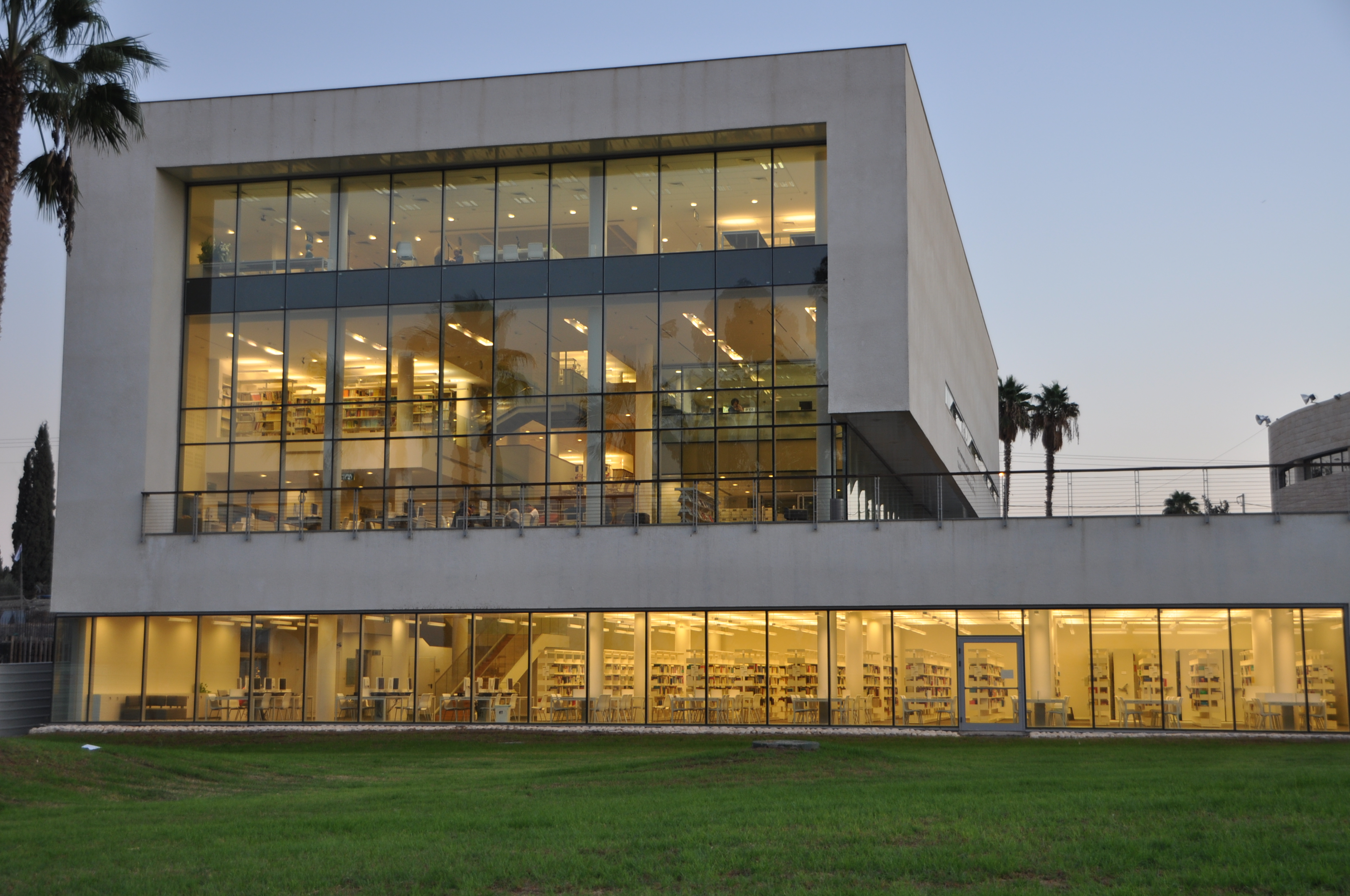 נקודת המבט מכיוון הכנרת